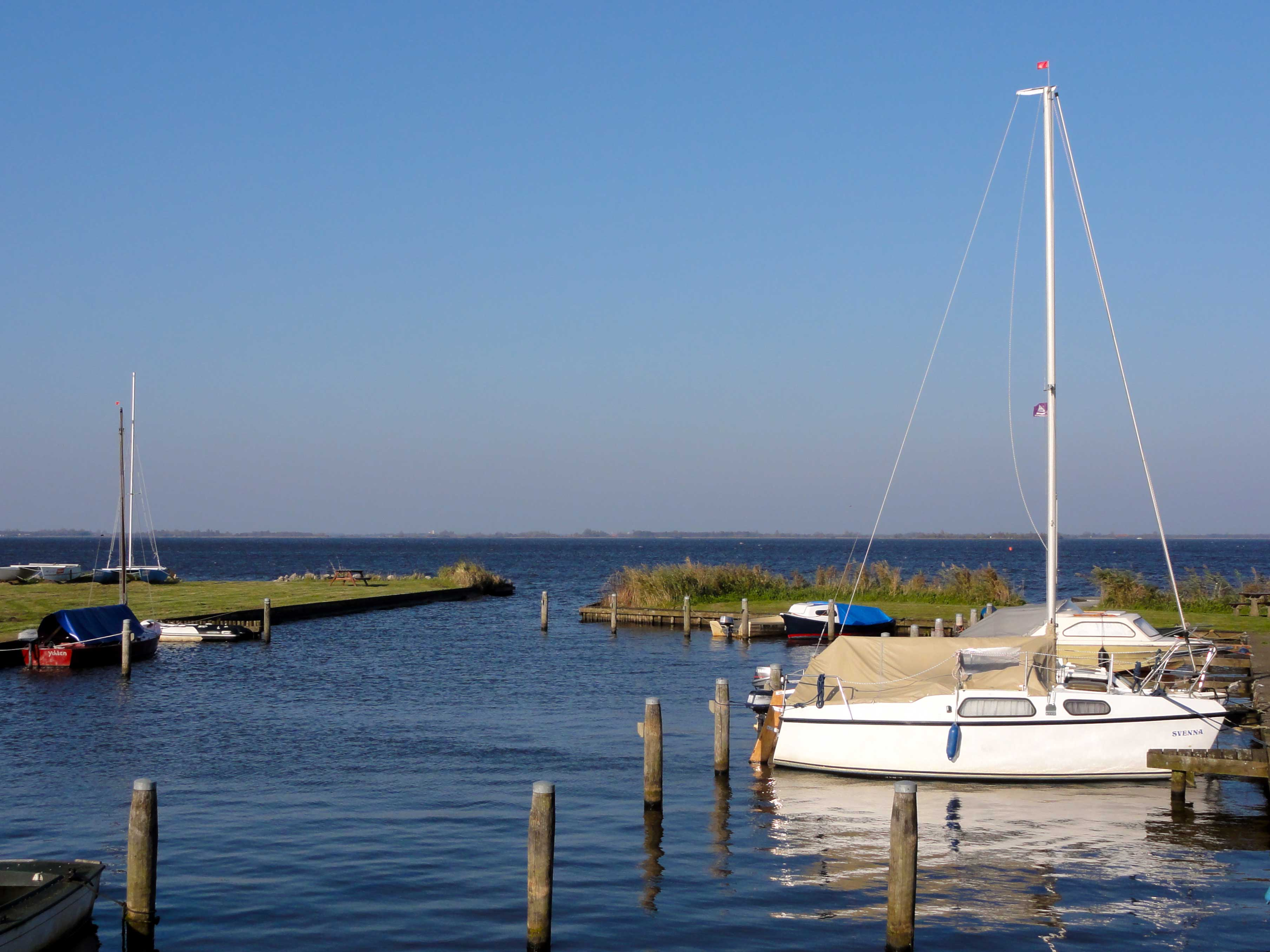 Haventje van Echten aan het Tjeukemeer